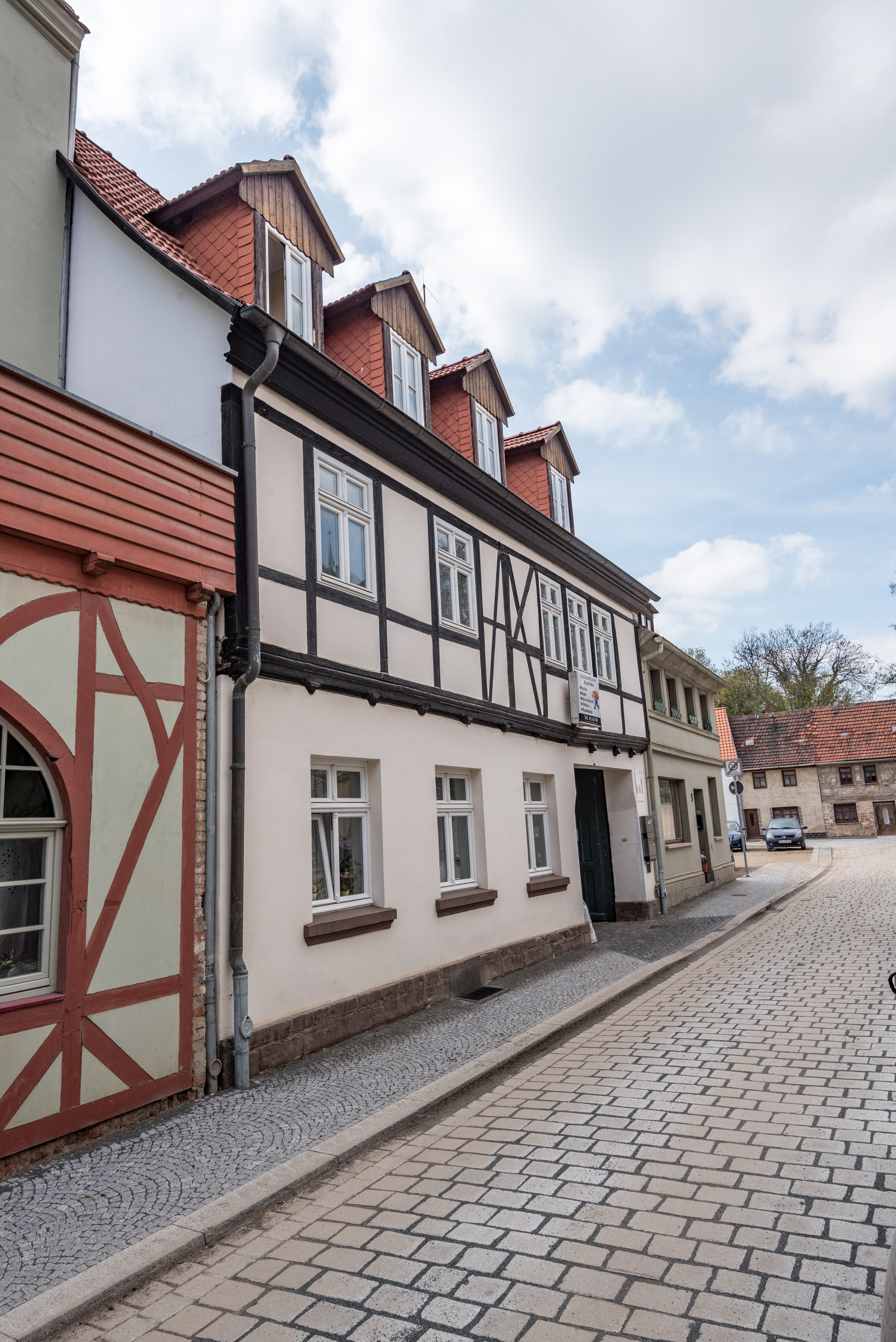 Aschersleben, Über dem Wasser 4